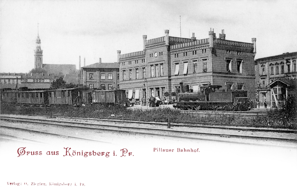 Königsberg